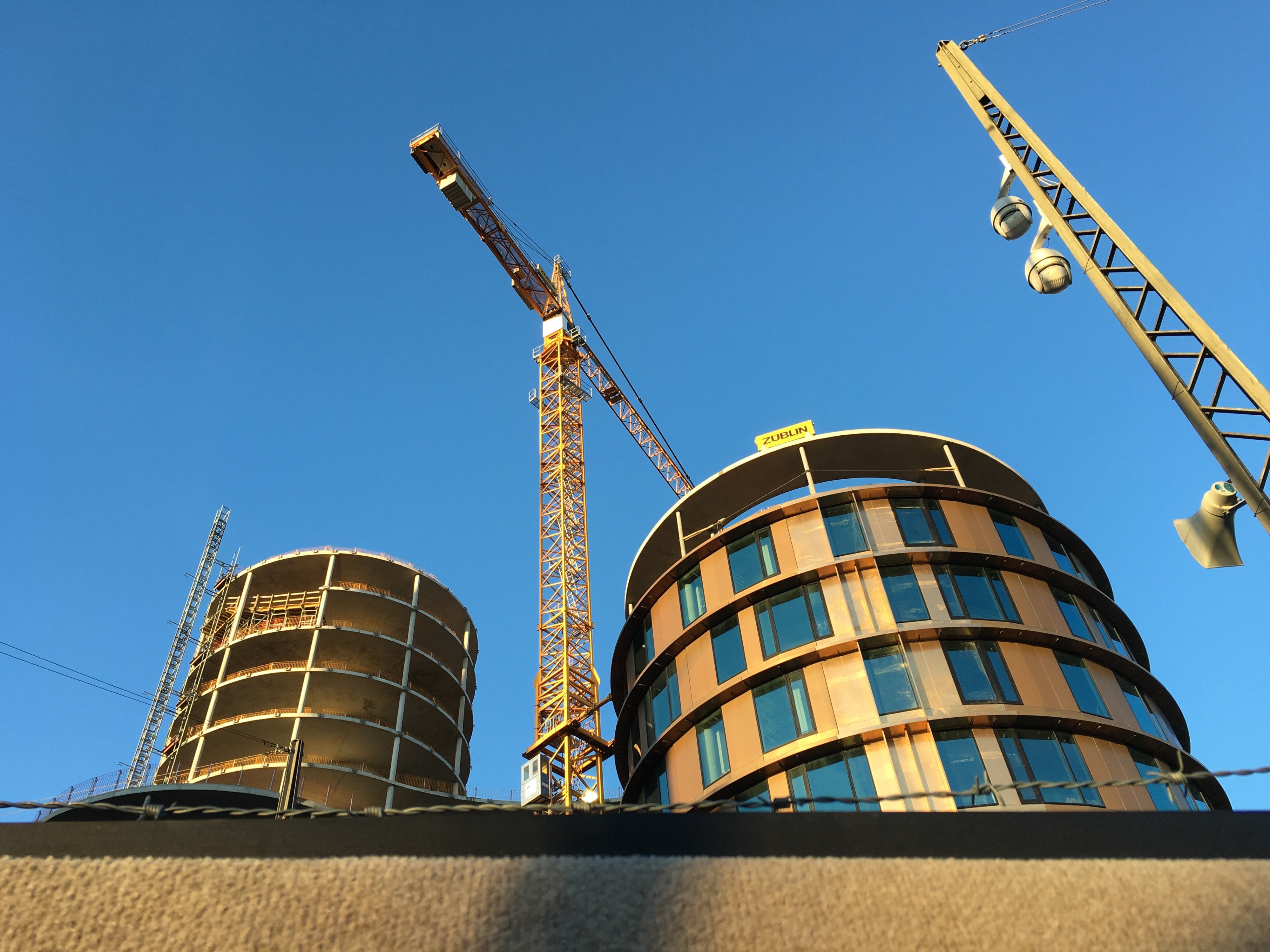 Axel Towers ved Axeltorv, København